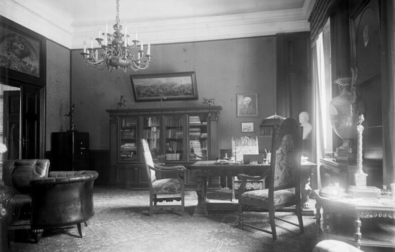 Das Reichspräsidenten-Palais fertiggestellt! Blick in das Arbeitszimmer des Reichpräsidenten, welches mit größter Einfachheit und schlichter Würde eingerichtet ist.